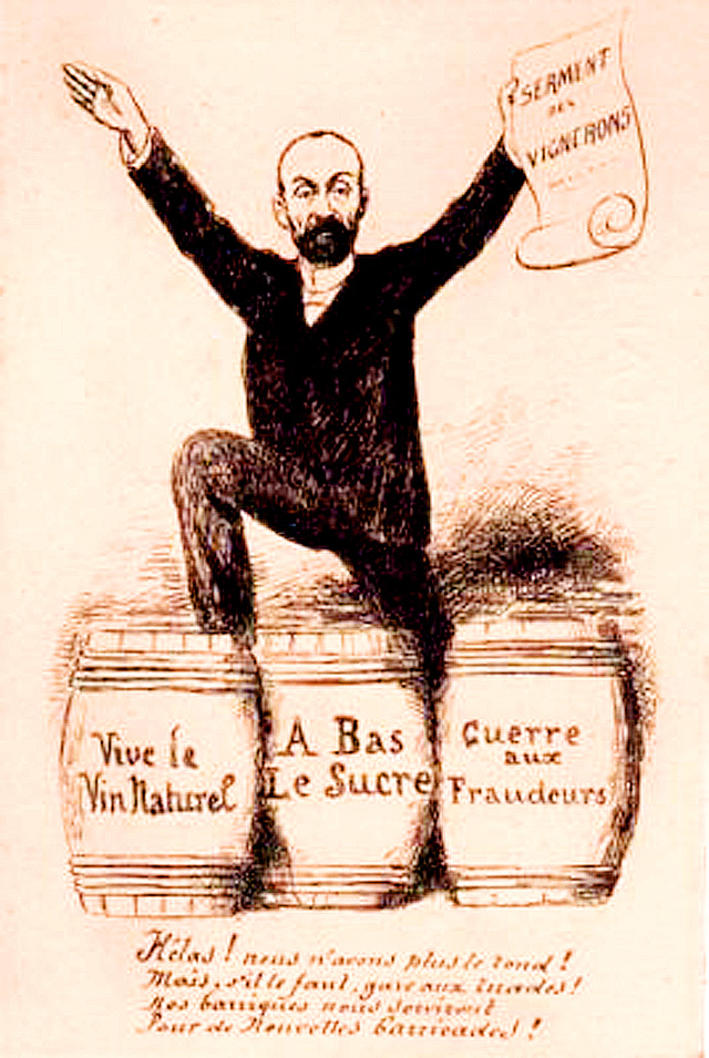 Marcelin Albert champion de la lutte contre les fraudeurs